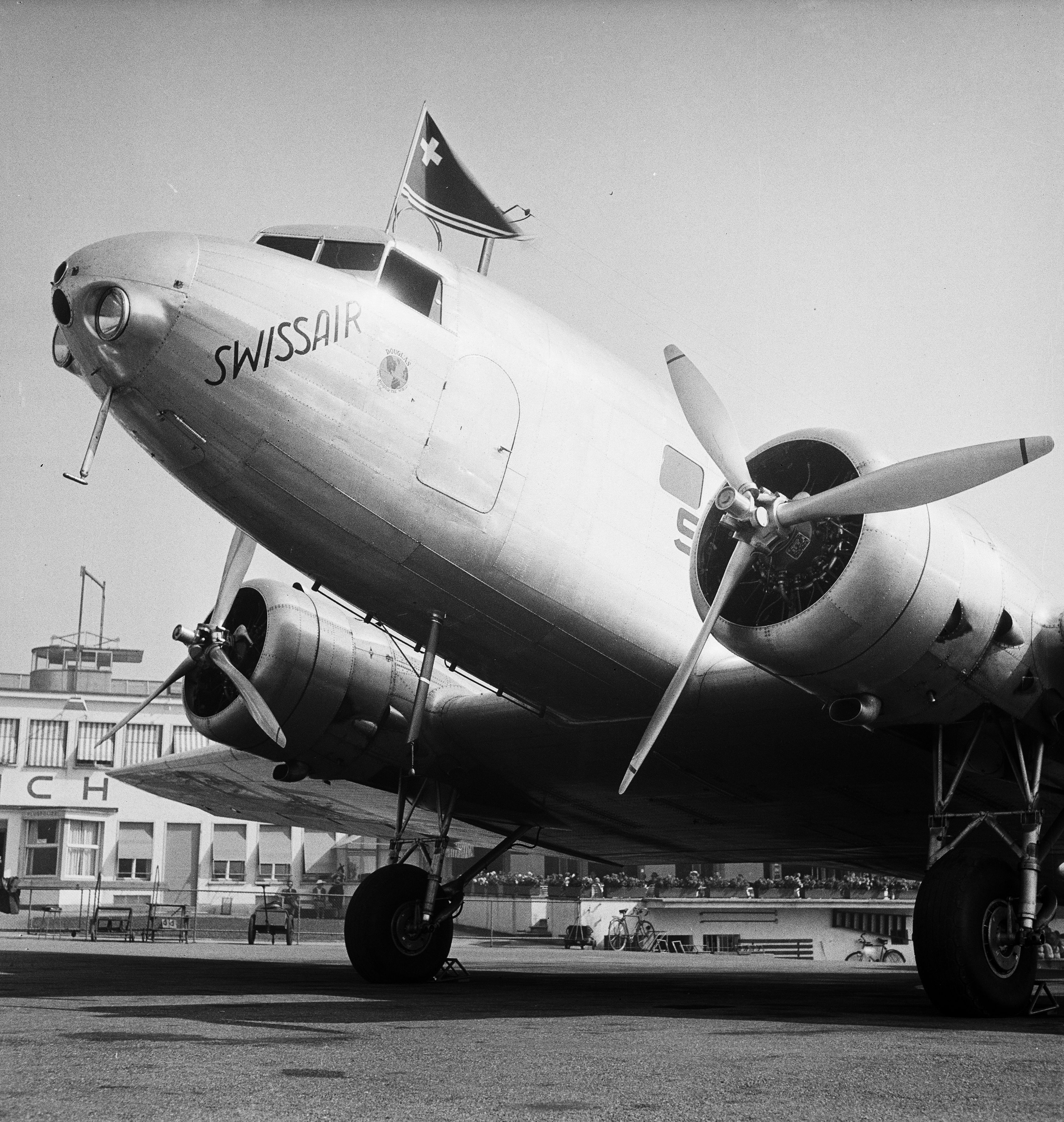 Douglas DC-2 der Swissair bereit zum Start am Boden in Dübendorf